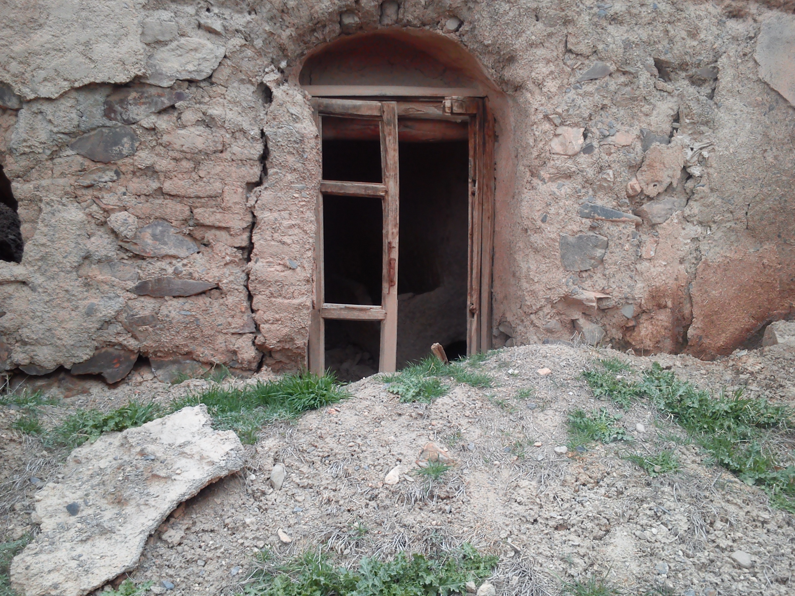 خرابه ات زیباتر از هر ابادی است